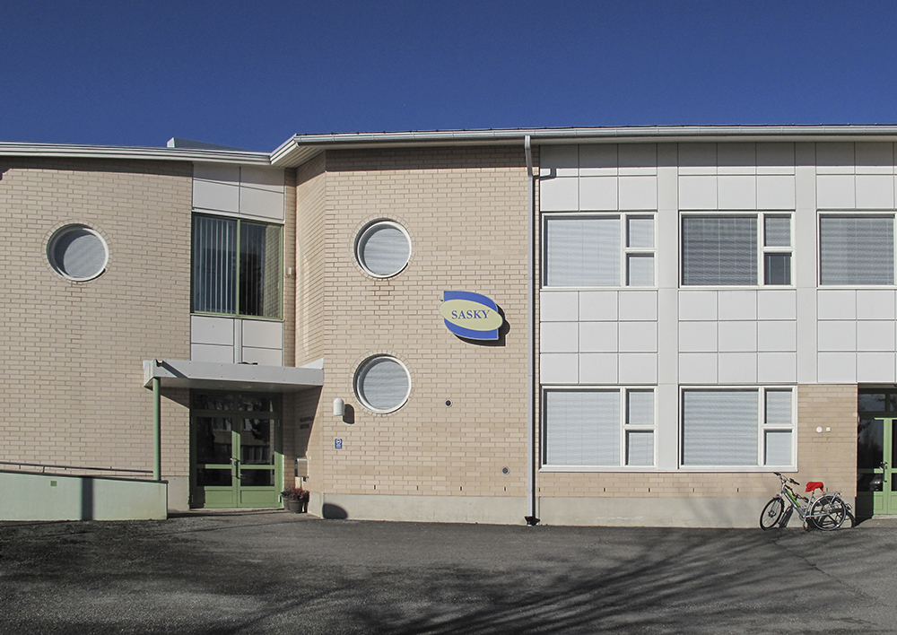 Vammalan ammattikoulun uuden osan sisäänkäynti